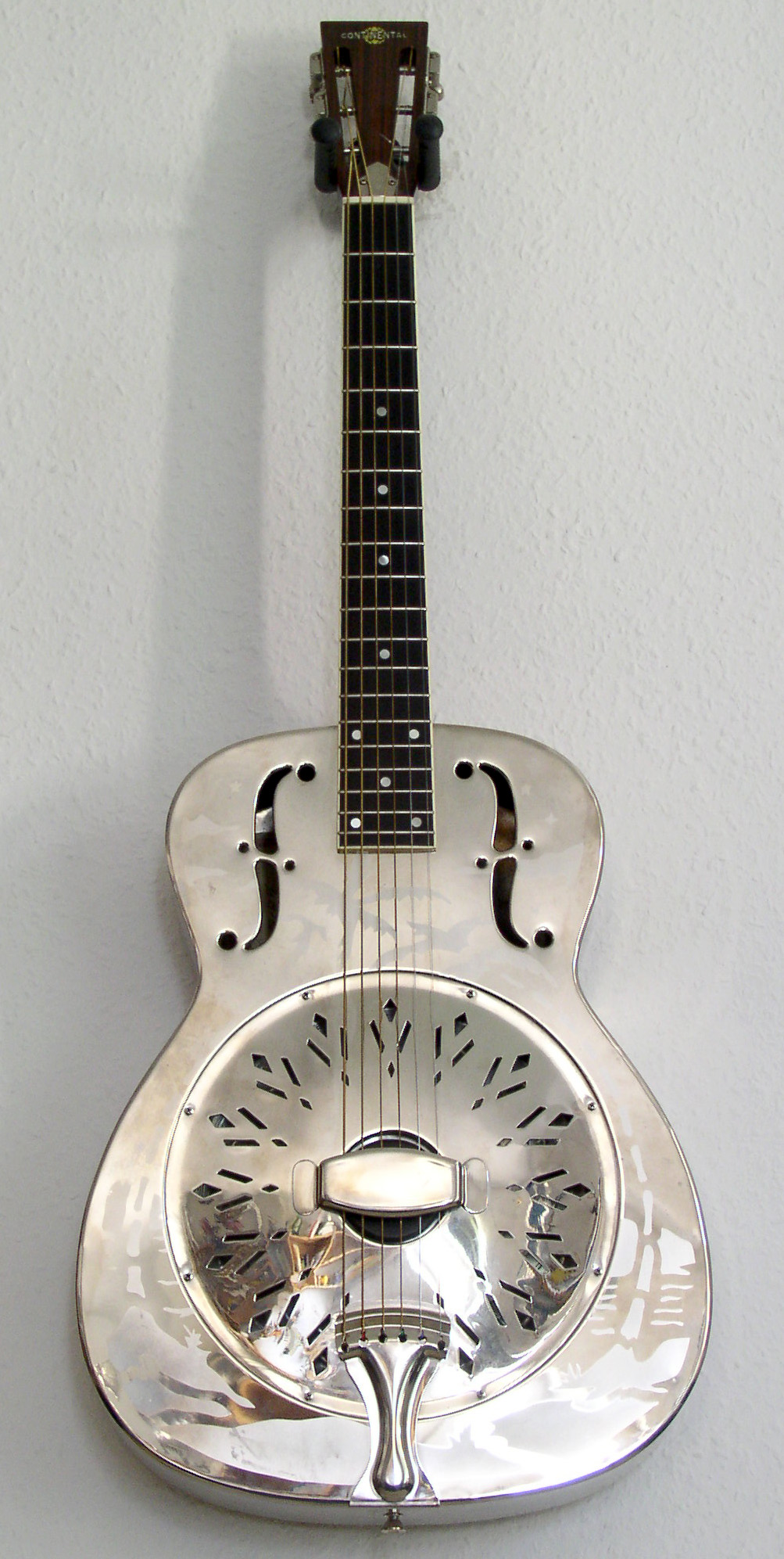 Singlecone-Resonatorgitarre mit Metallkorpus